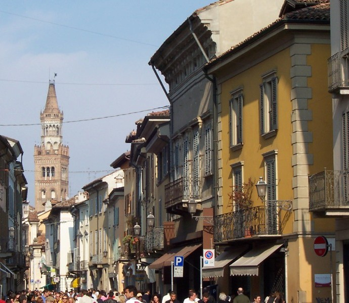 Crema - Via XX Settembre